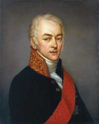 Alexei Kirillowitsch Rasumowski